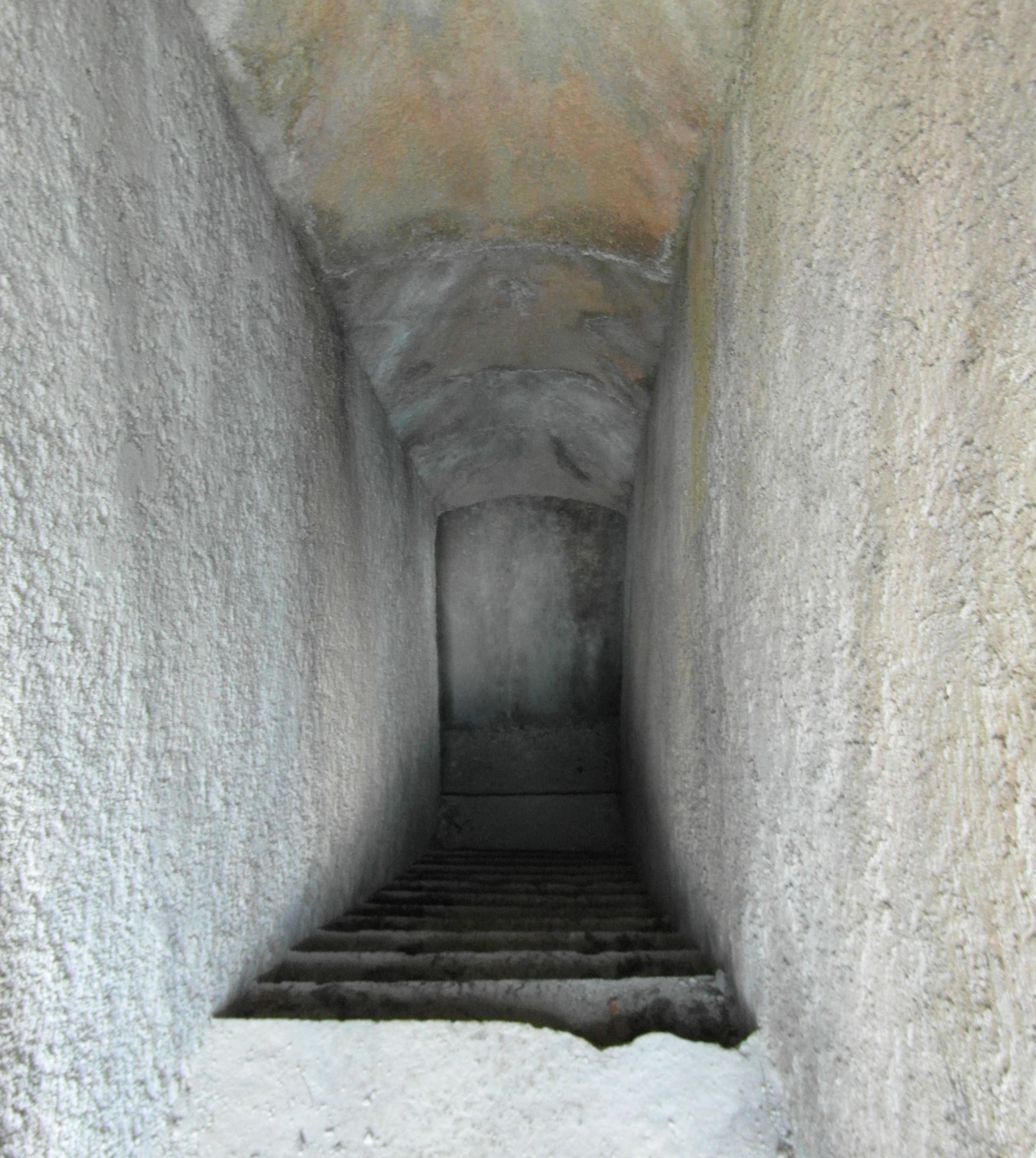 Forte Le Finestrelle